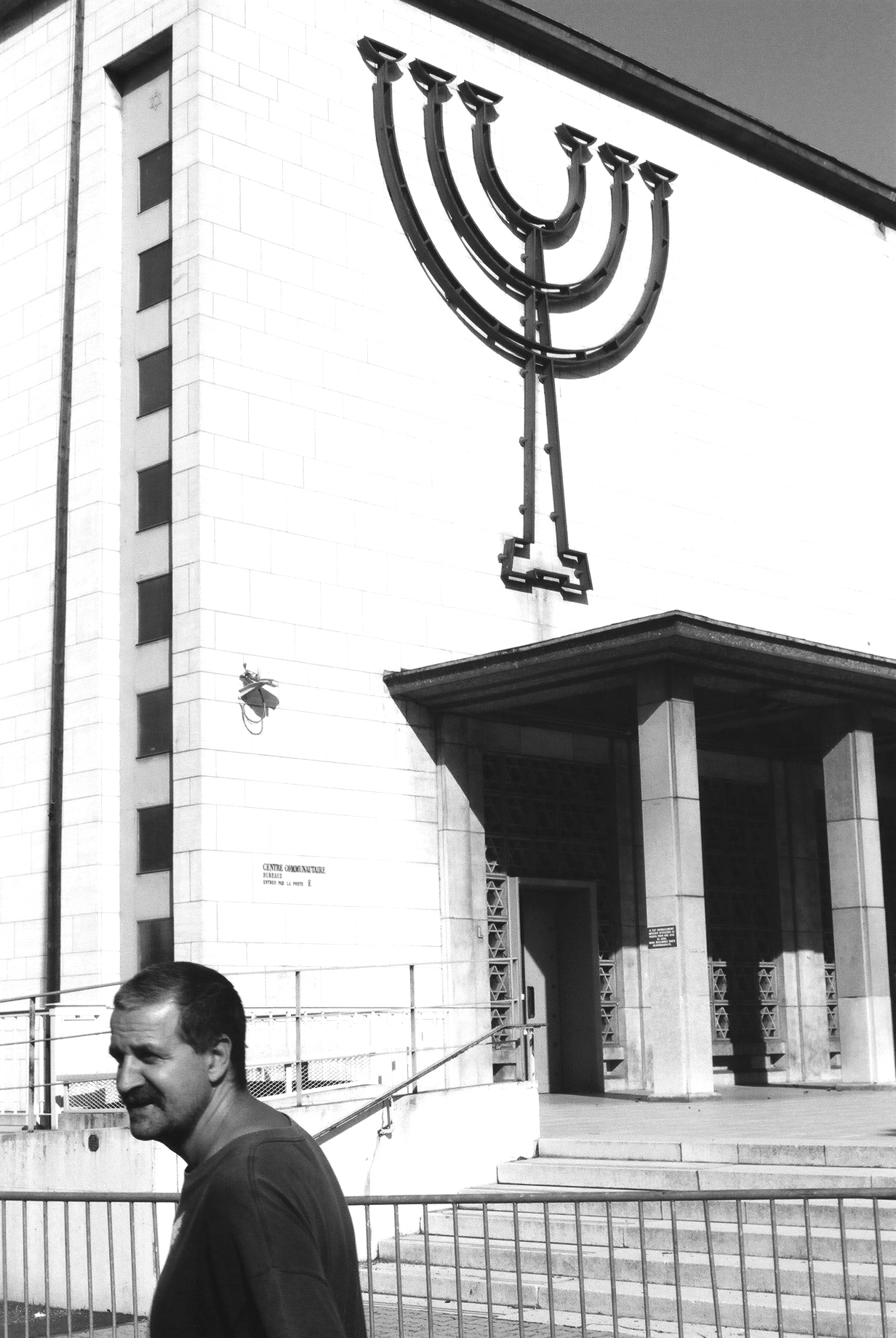 Georges Federmann, devant la synagogue de Strasbourg, Septembre 2002. (photographié par son fils David Federmann)